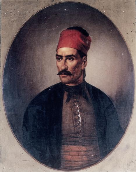 Griechischer Freiheitskämpfer, 1821